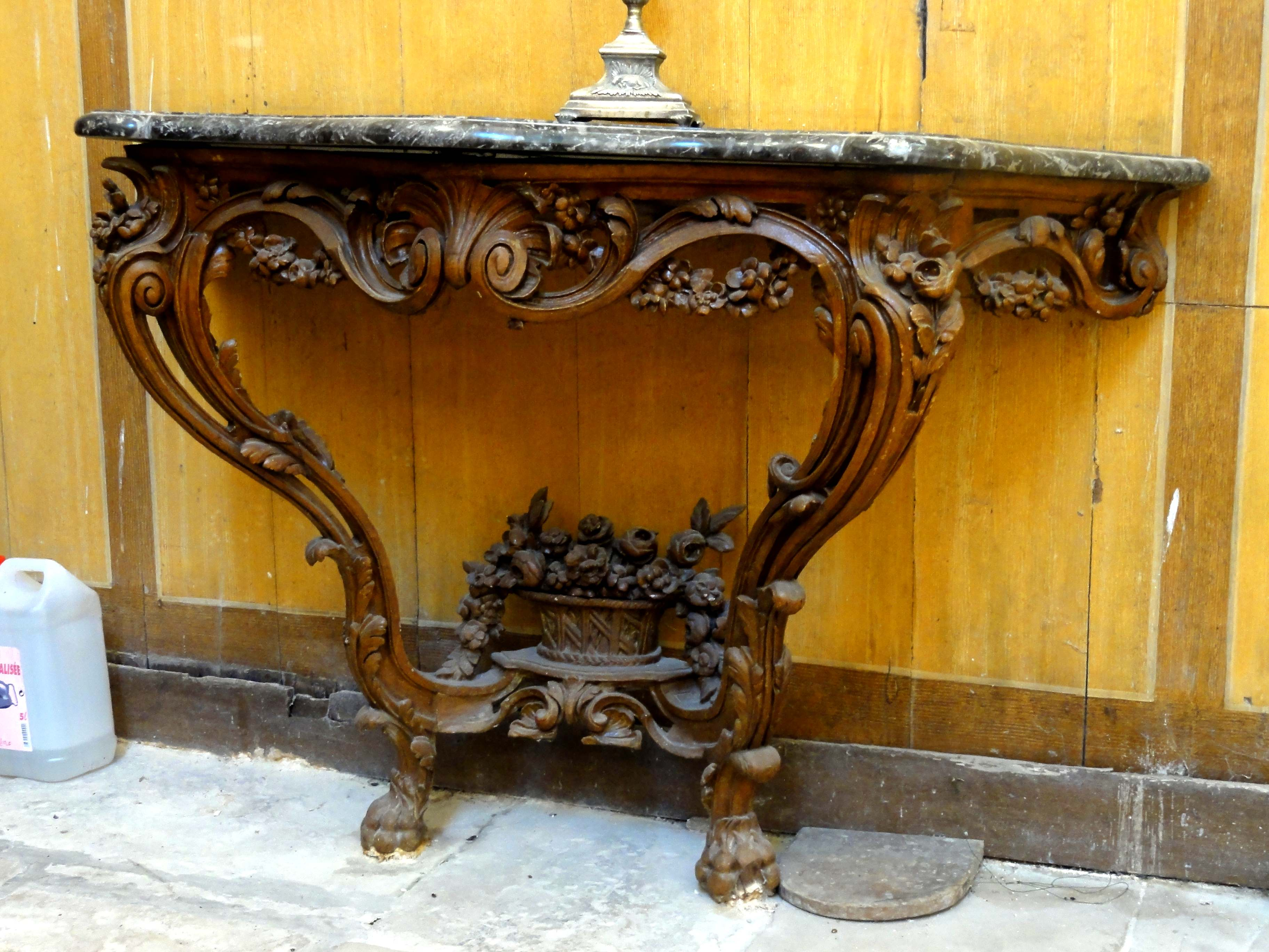 Mobilier de l'église (voir titre).